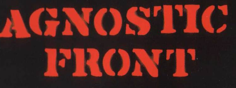 Logo der Band Agnostic Front auf "Riot, Riot, Upstart" (1999)